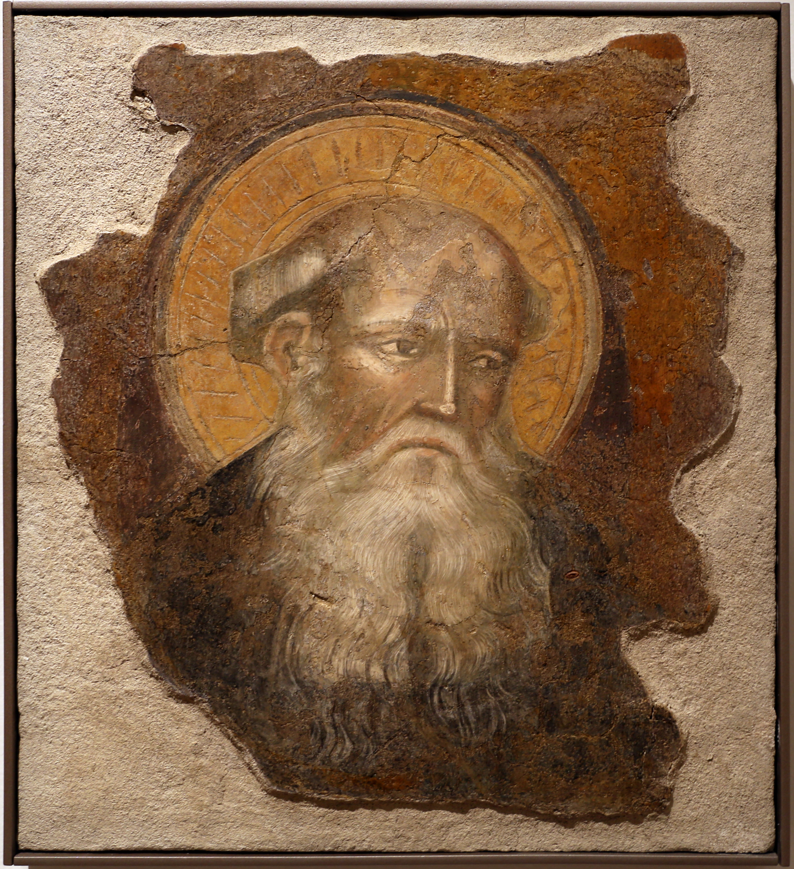 chiesa di San Giacomo Apostolo dei Domenicani This is a photo of a monument which is part of cultural heritage of Italy.